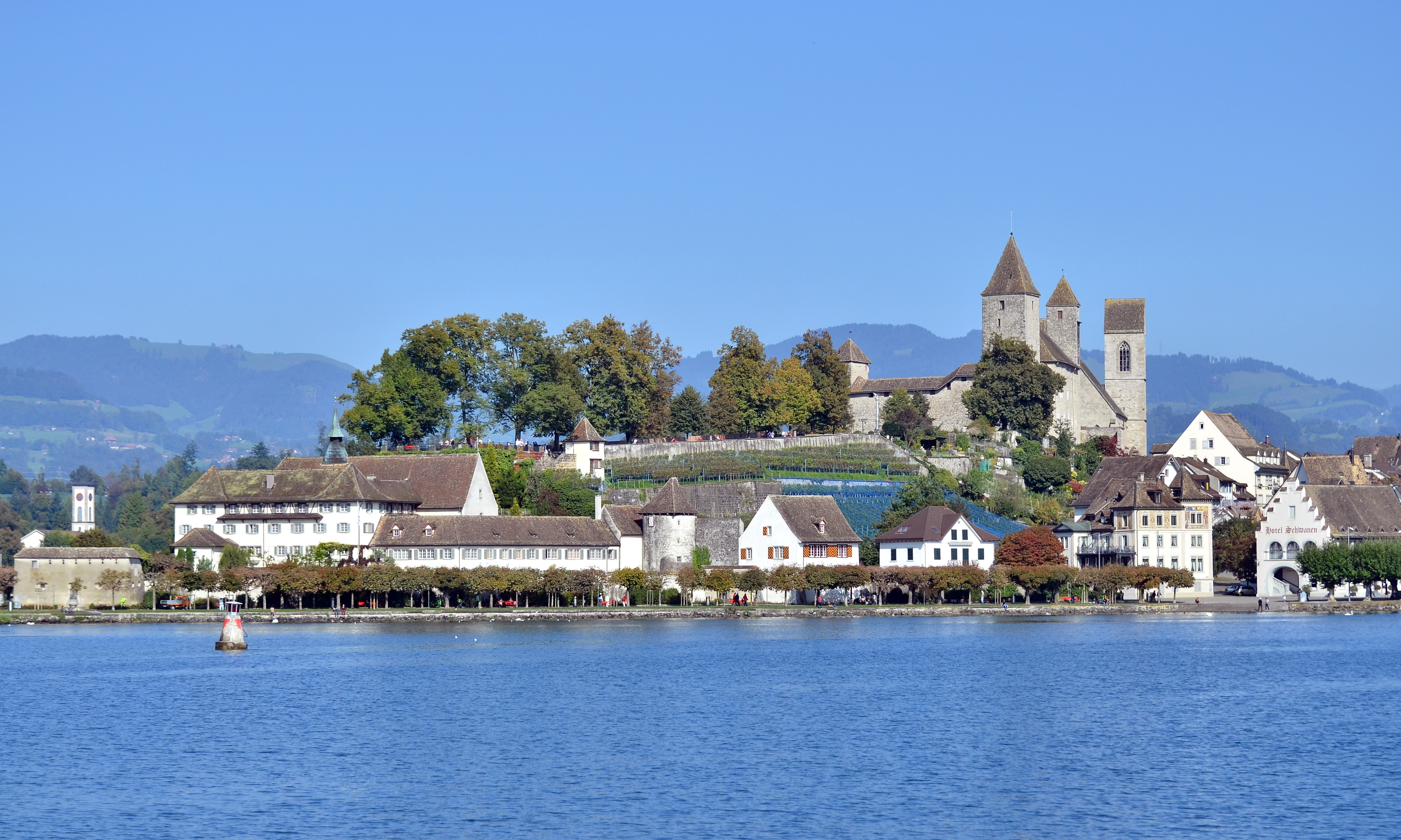 Bühler-Allee and Einsiedlerhaus as well as the Lindenhof hill in Rapperswil (Switzerland) as seen from the harbour area at Curti-Platz respectively the Zürichsee-Schiffahrtsgesellschaft (ZSG) landing gate as seen from Zürichsee-Schifffahrtsgesellschaft MS Panta Rhei on Zürichsee in Switzerland